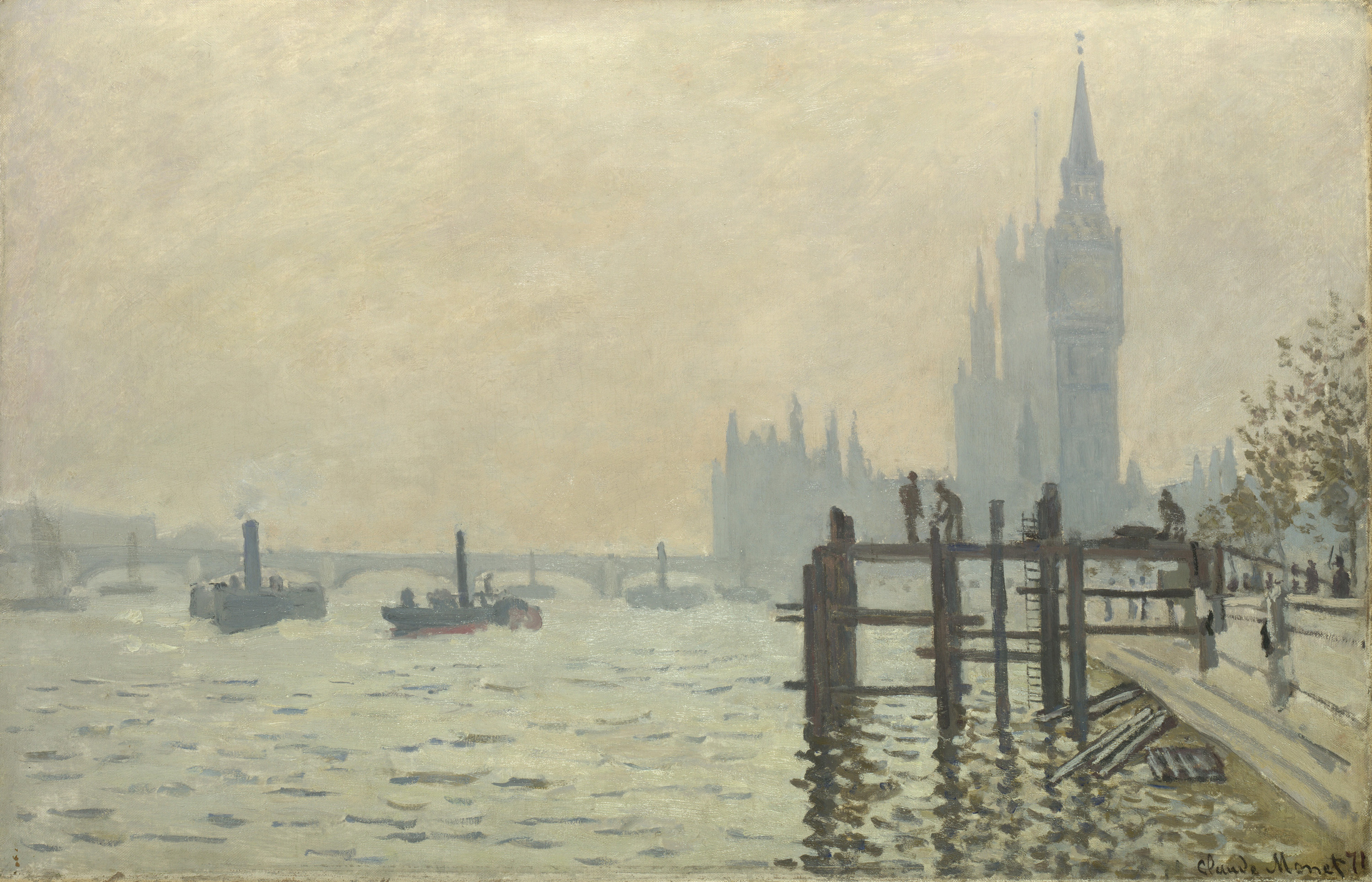 El cuadro llamado The Thames at Westminster fue pintado por Monet durante su estancia en Londres en 1872